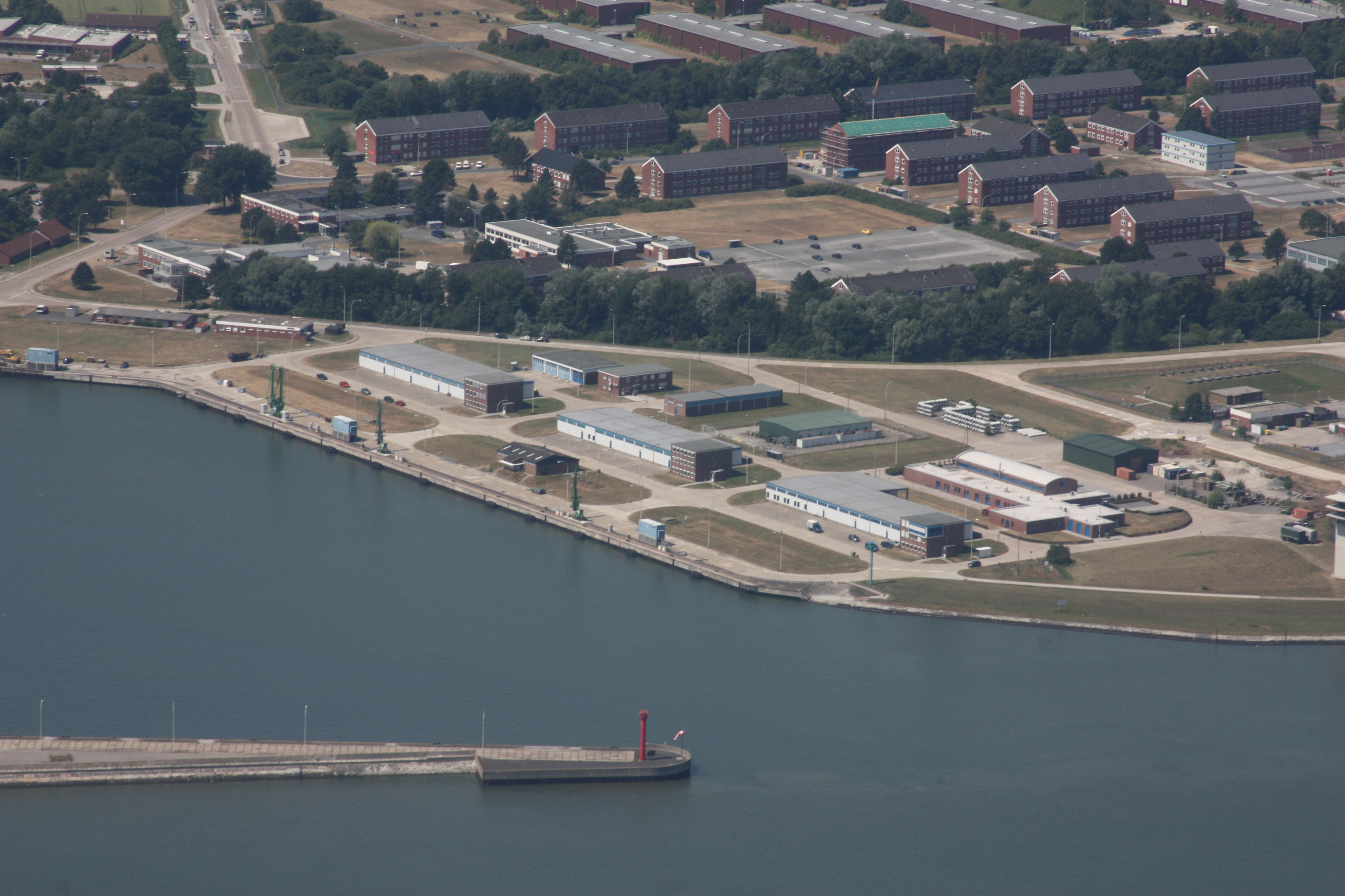 Flug über den Jadebusen und Wilhelmshaven, von Nord nach Süd; weiter nachOldenburg; Flughöhe 500 m = 1500 ft; Juli 2010